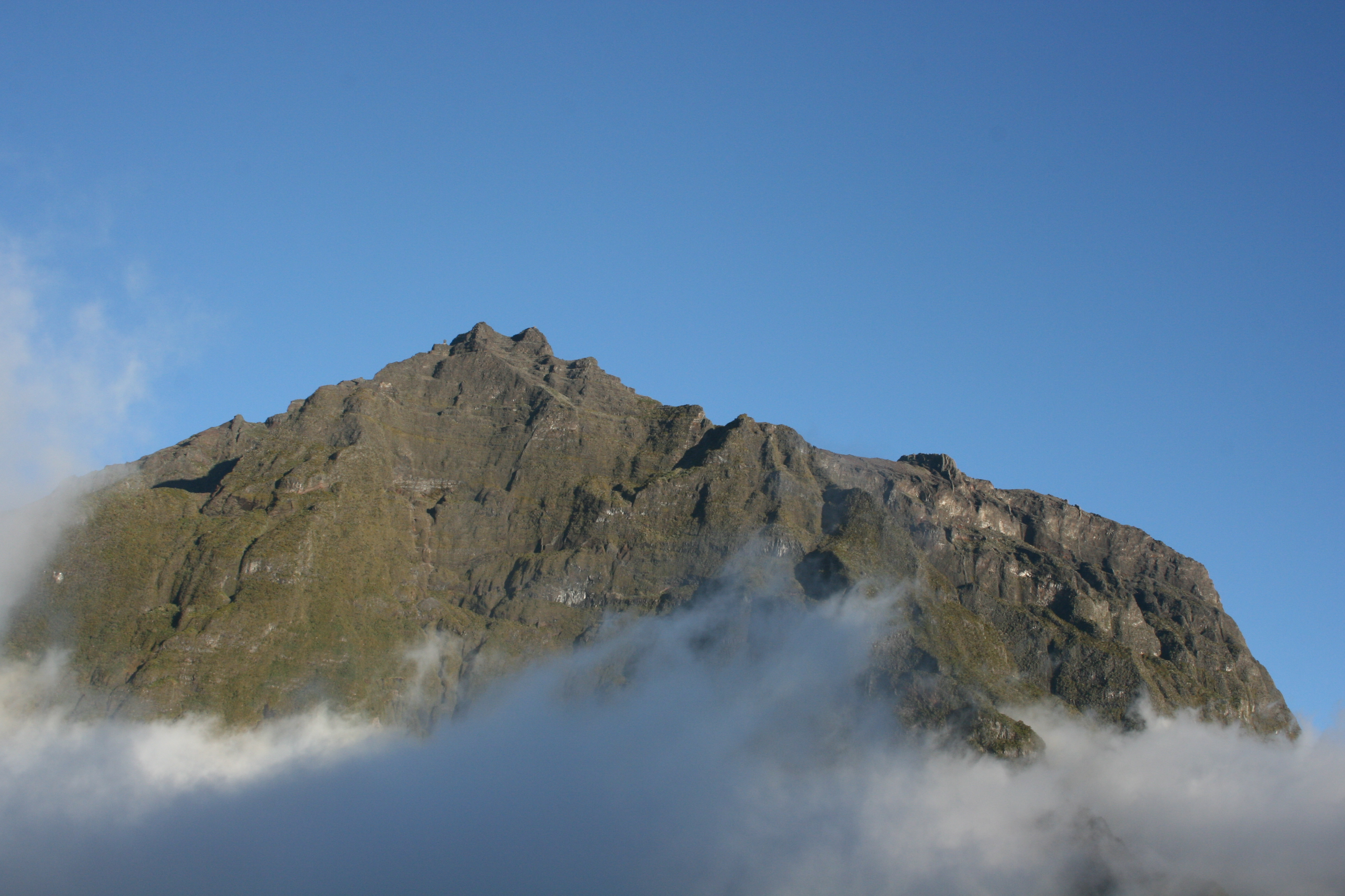 Le Gros Morne vu depuis le Petit Col situé entre Mafate et Salazie, à la Réunion